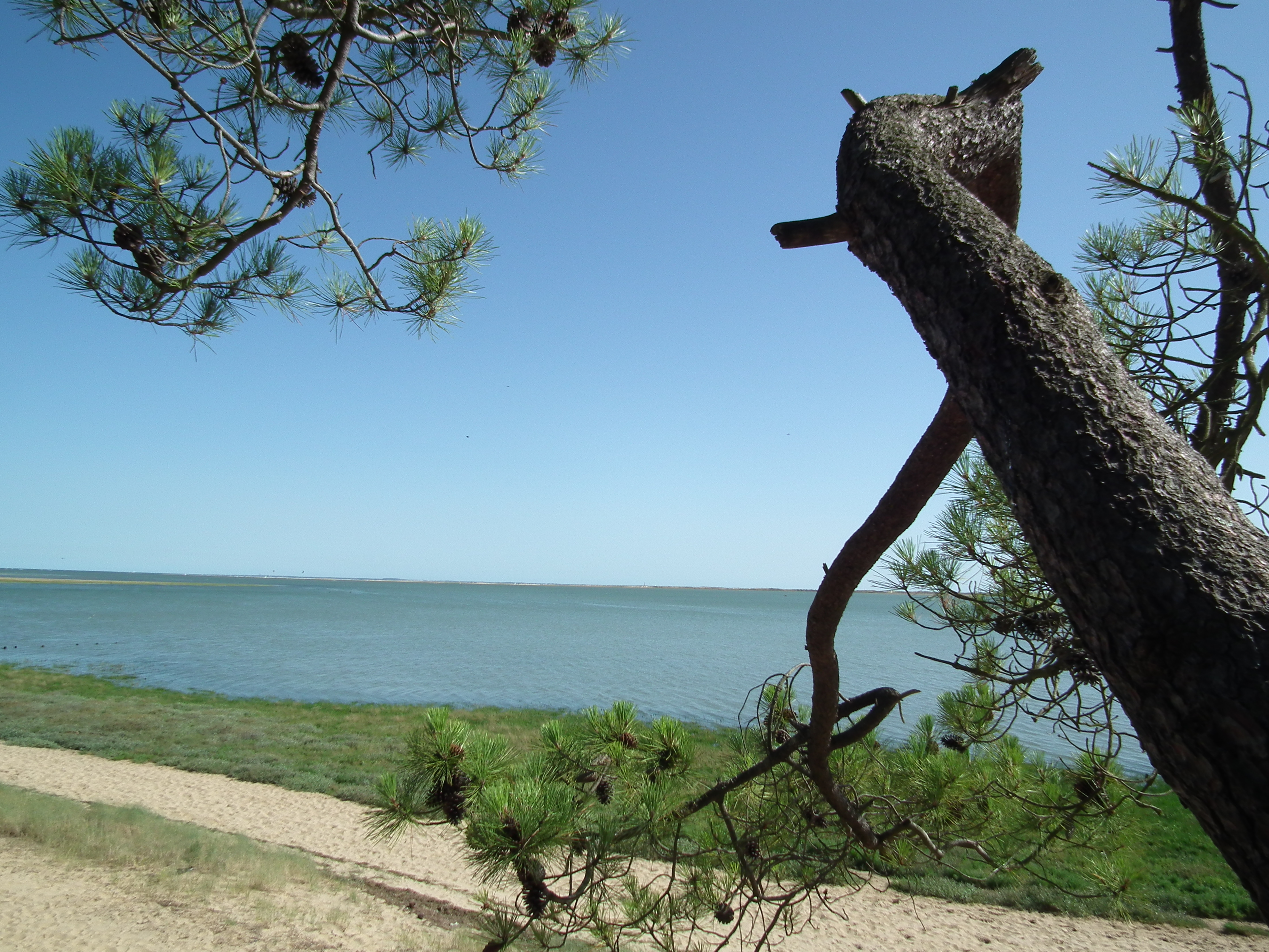 Bord de mer à Bonne Anse